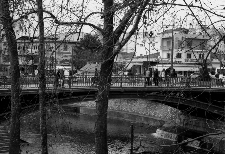 Bridge by Lithaios river, Trikala, Greece Γέφυρα, Ληθαίος ποταμός, Τρίκαλα